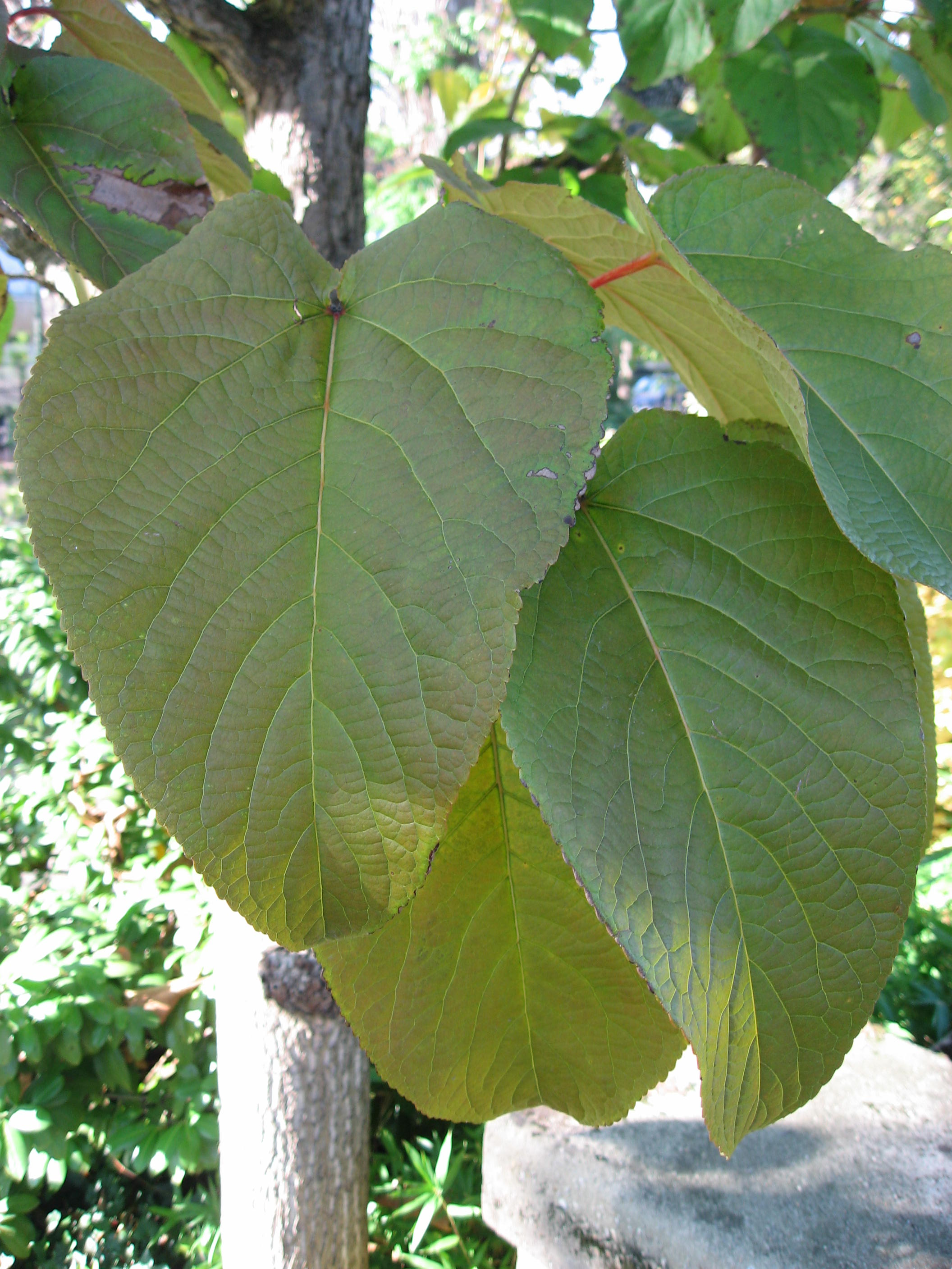 Populus lasiocarpa in Serres d'Auteuil Map: 48° 50' 49" N 2° 15' 8" E